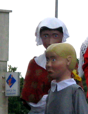 Ham (Somme, France) - Animation festive au centre-ville, un dimanche de printemps. Les géants Dudule et Armandine descendant la rue du Château pour rejoindre la rue de Noyon. On remarque l'enseigne de l'Office de Tourisme.